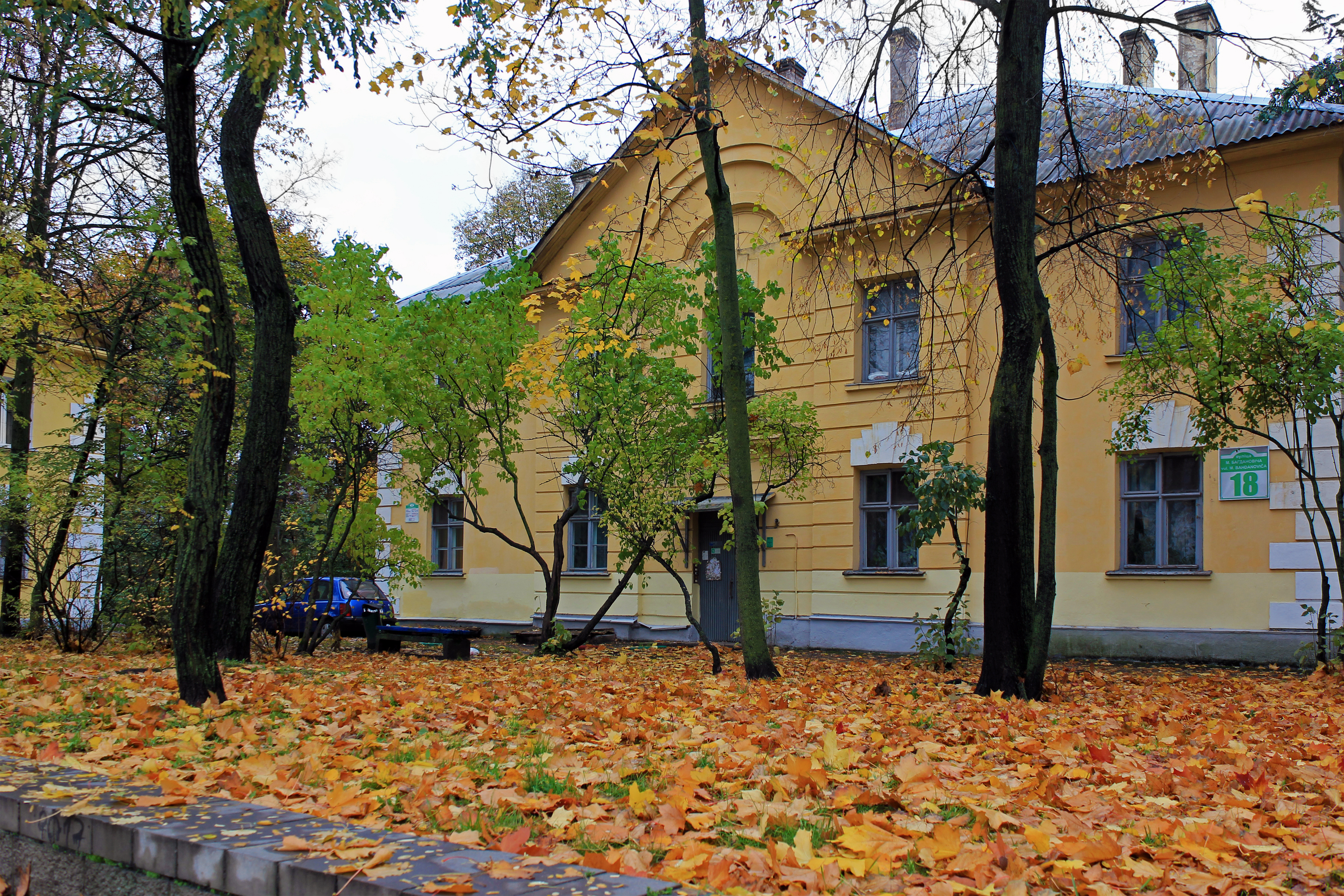 Минск. Дом на улице Богдановича (микрорайон Осмоловка)